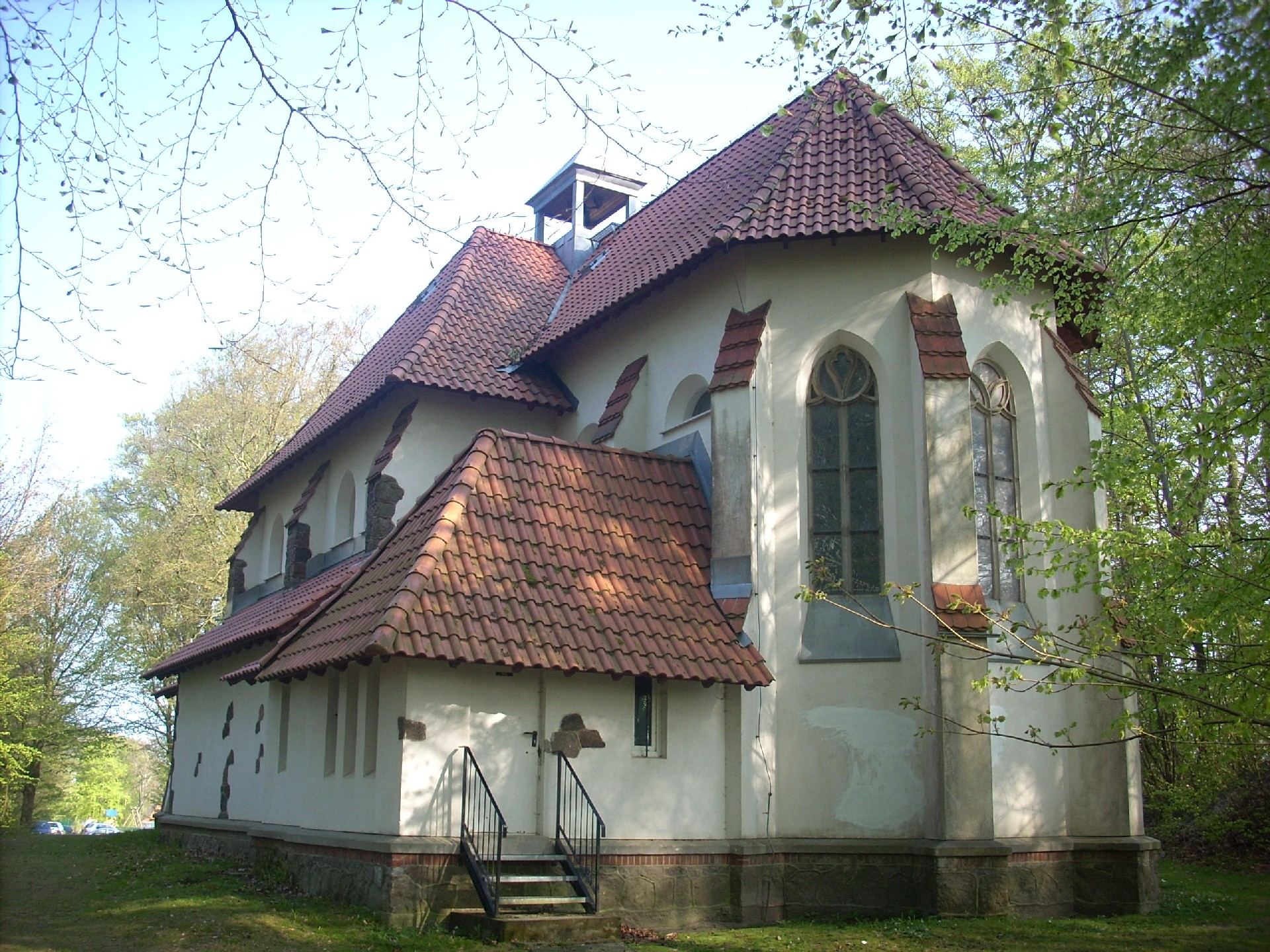 Kath. Kirche Maria Meeresstern, Sellin auf Rügen, Deutschland